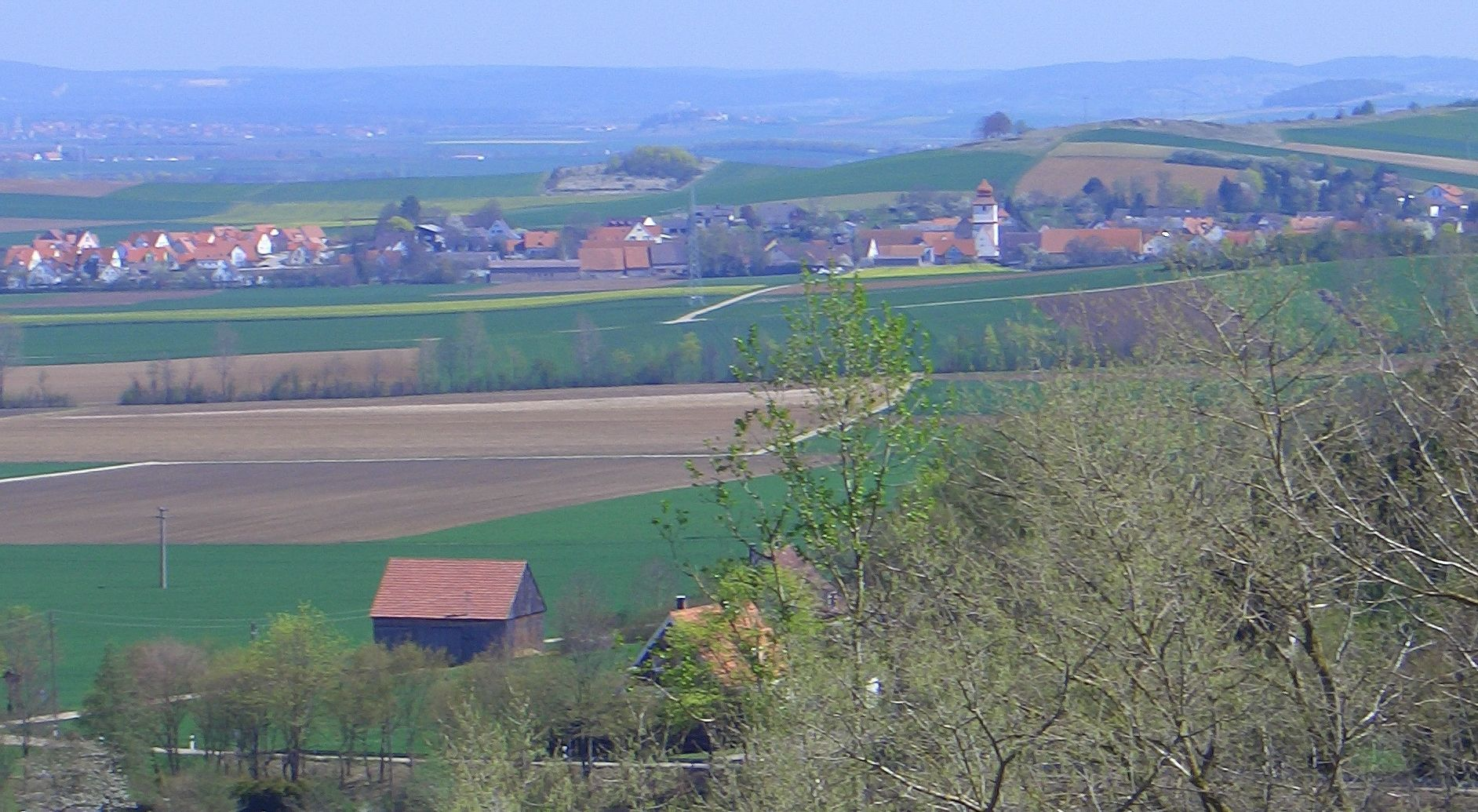 Blick von Westen auf Herkheim